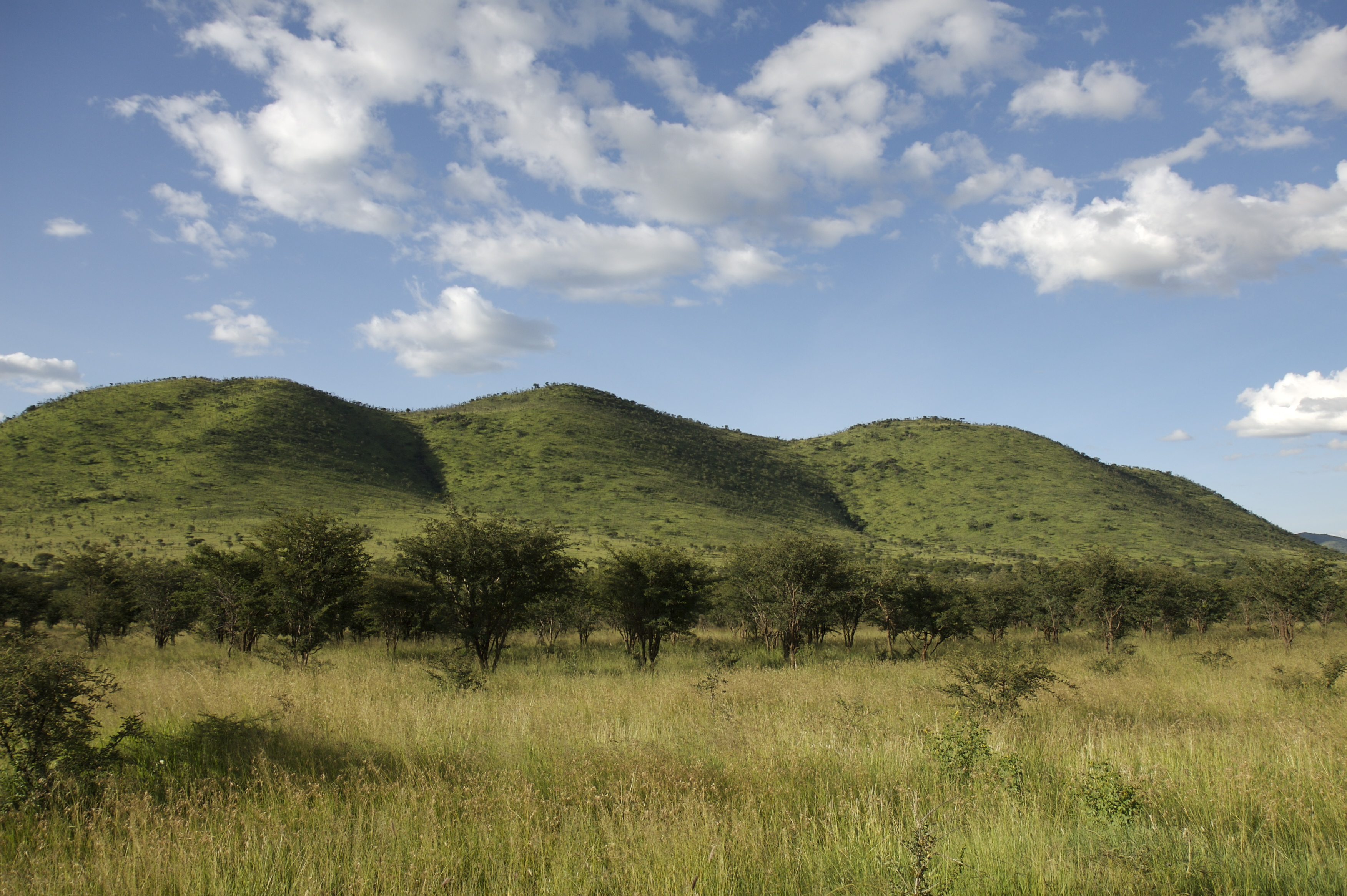 Serengeti, Western Corridor